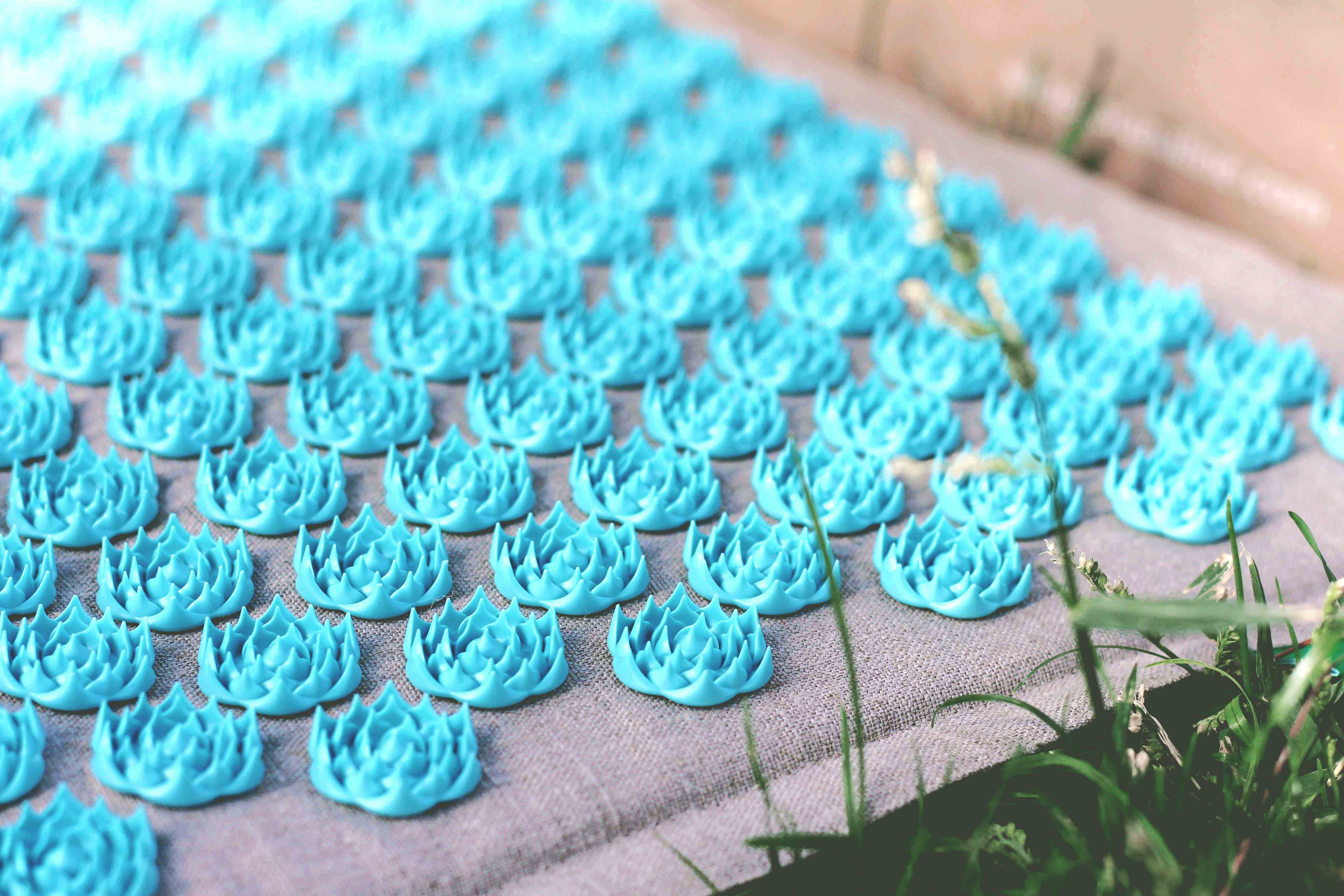 foto de esterilla